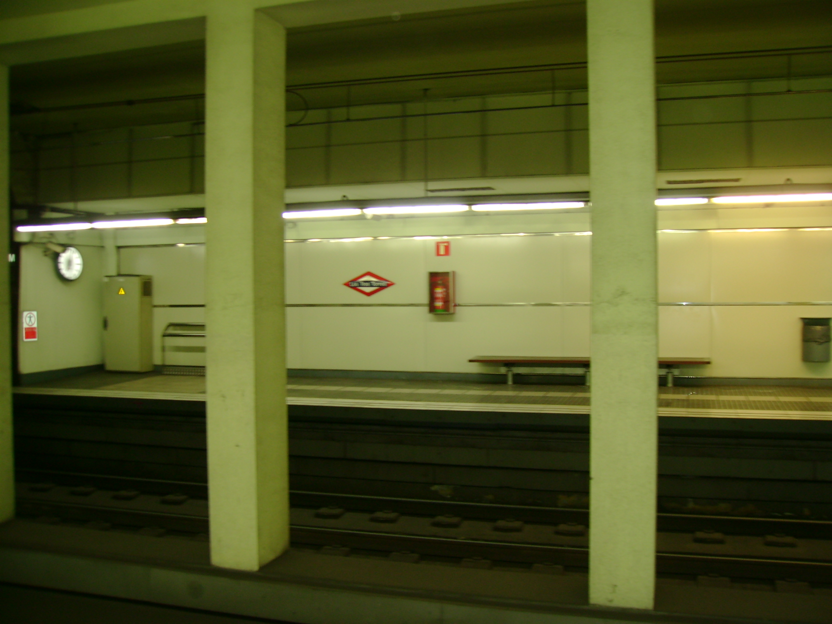 Foto capturada per la meva càmara a l'estació de les Tres Torres (Metro de Barcelona).